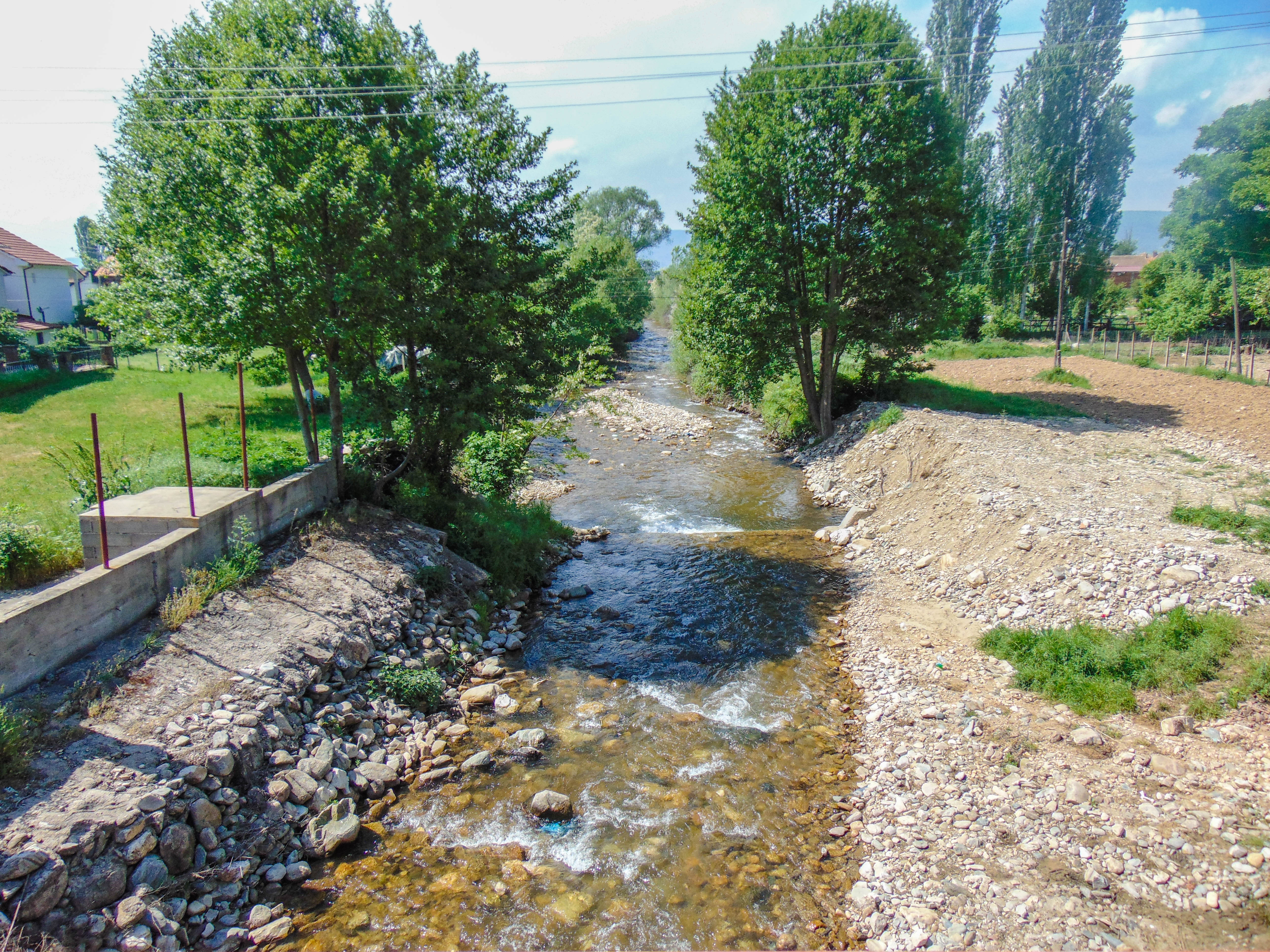 Подареш - Радовиш